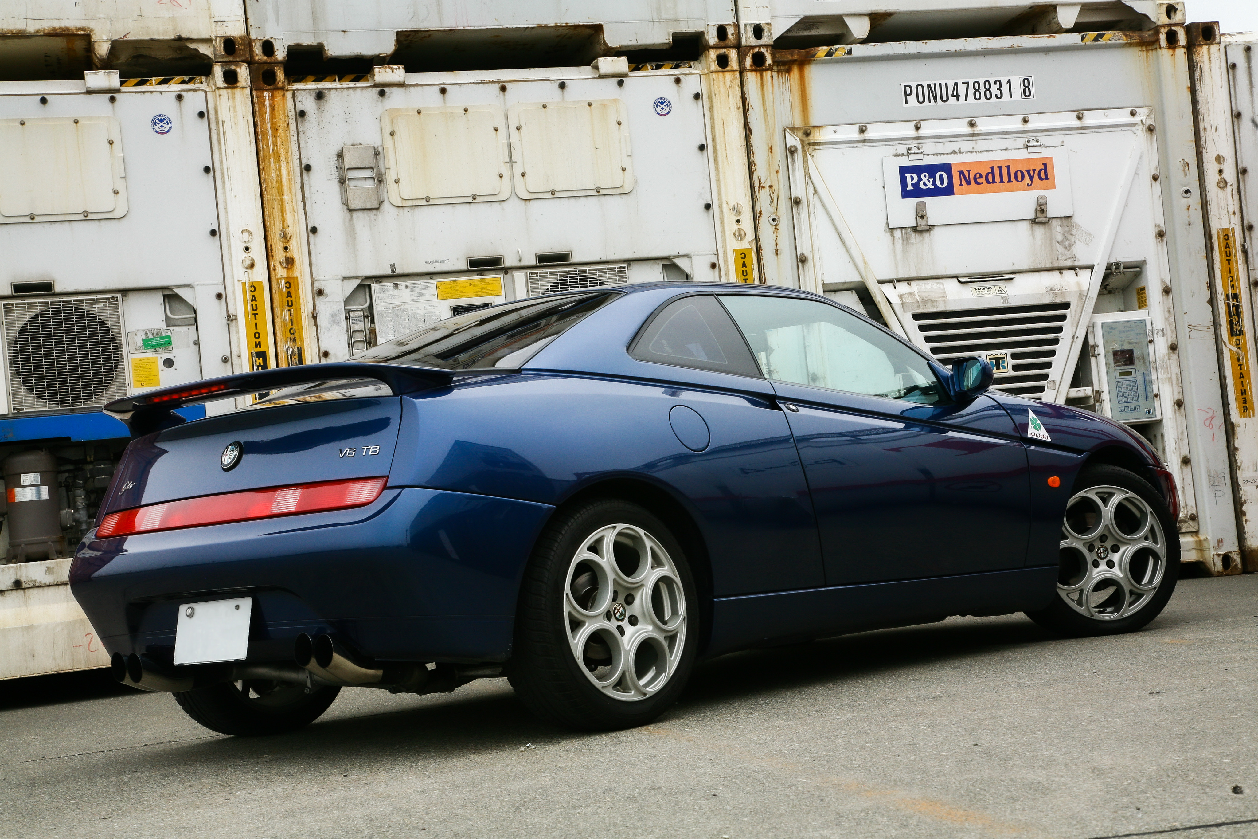 2.0 V6 TB